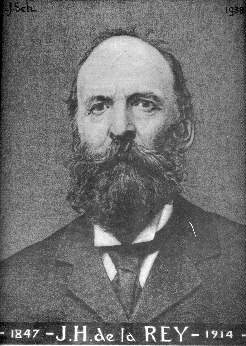 Generaal Koos de la Rey (Jacobus Herculaas de la Rey) (22 Oktober 1847 - 15 September 1914) was 'n Boeregeneraal gedurende die Tweede Vryheidsoorlog en word geag as een van die grootste militêre leiers tydens daardie konflik.